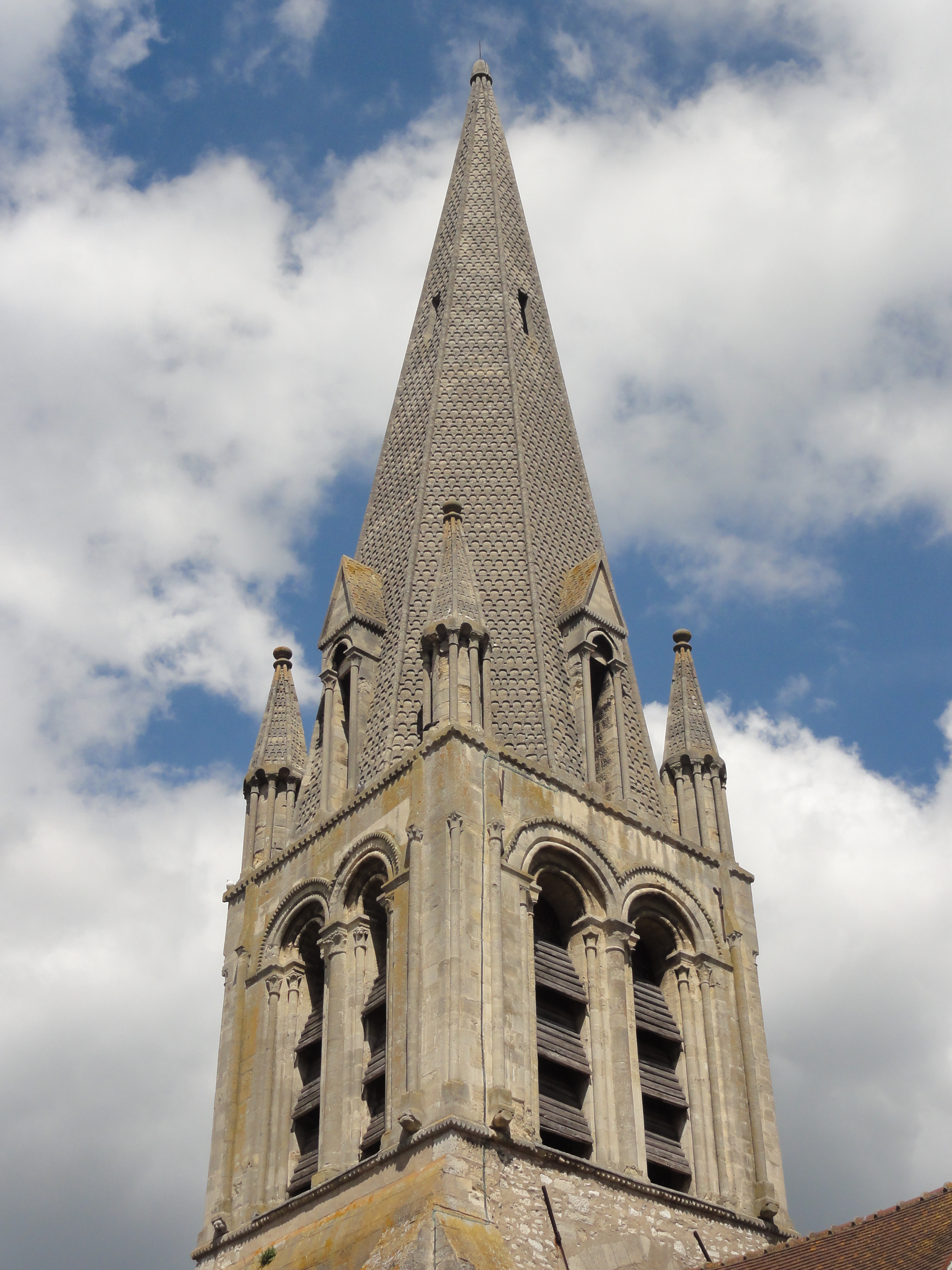 Clocher, vue depuis le sud-est.